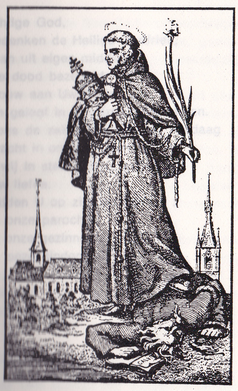 Heilige Godfried Coart